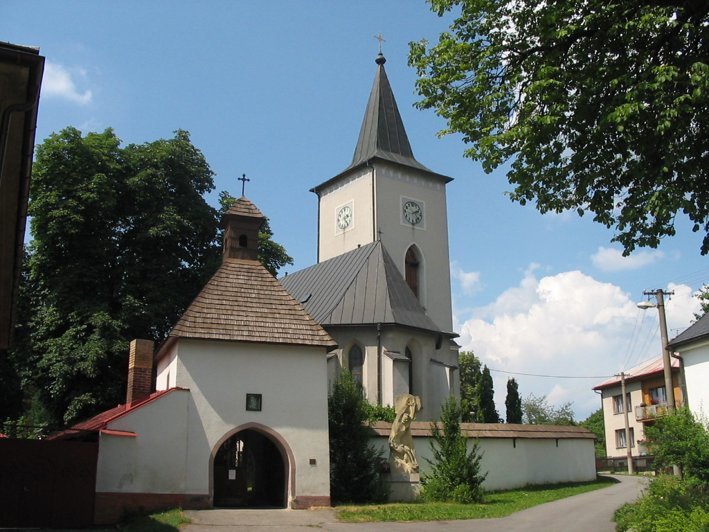 Kostel Sv.Jakuba ve Velké Losenici.